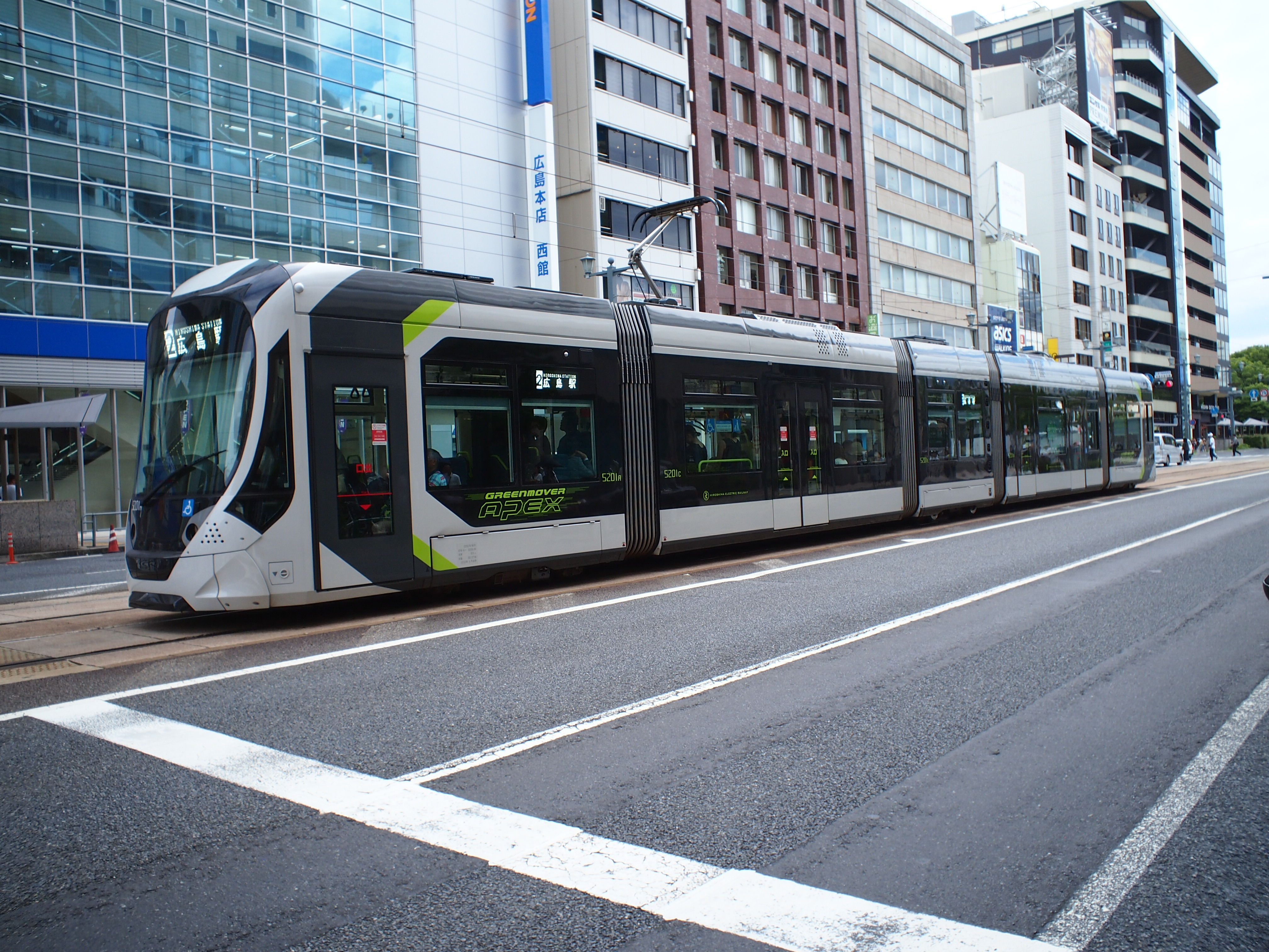 広電5200形電車